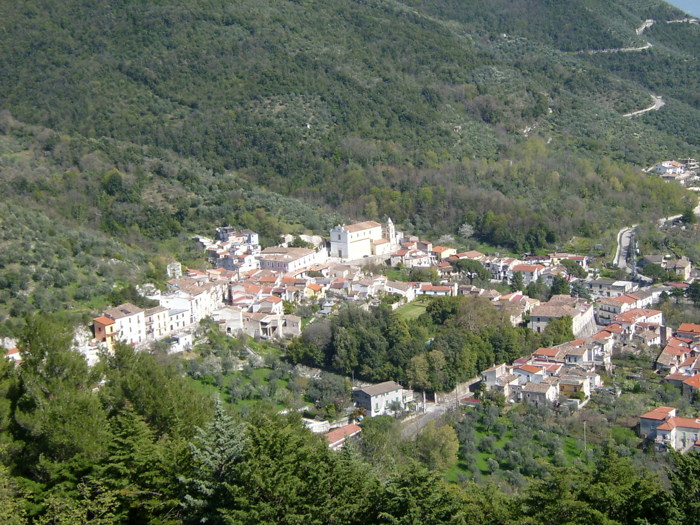 S. Angelo d'Alife - Panorama